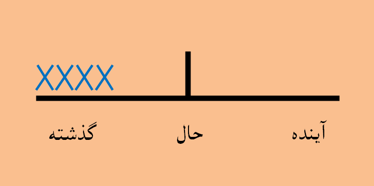 USED TO DIAGRAM